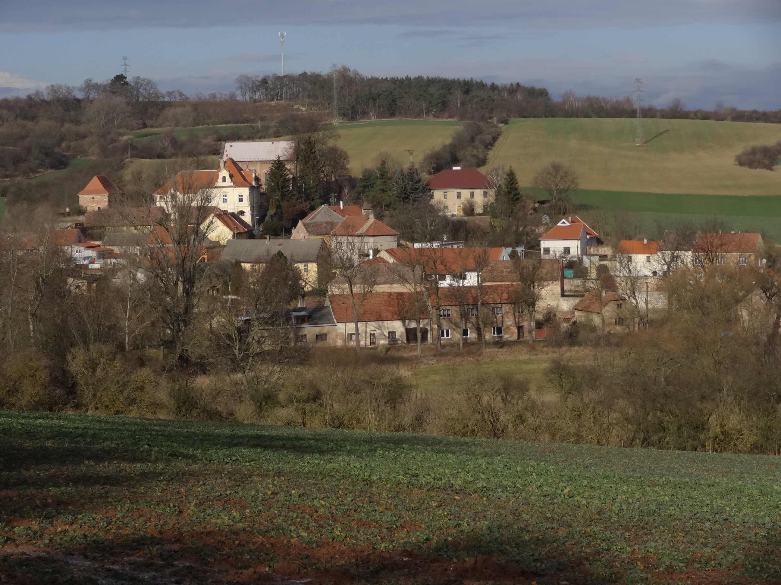 Kvílice - celkový pohled od jihu